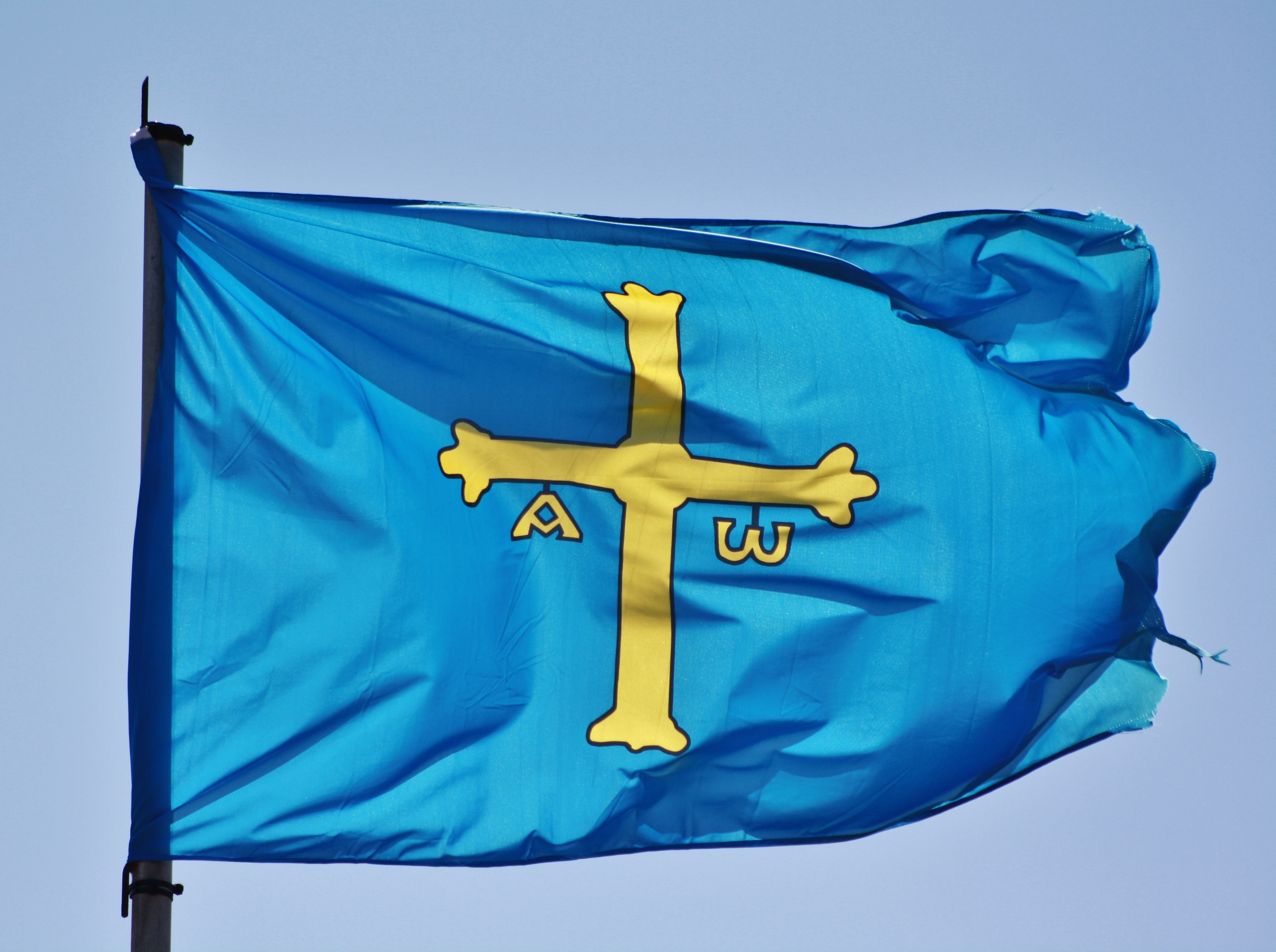 Bandera d'Asturies